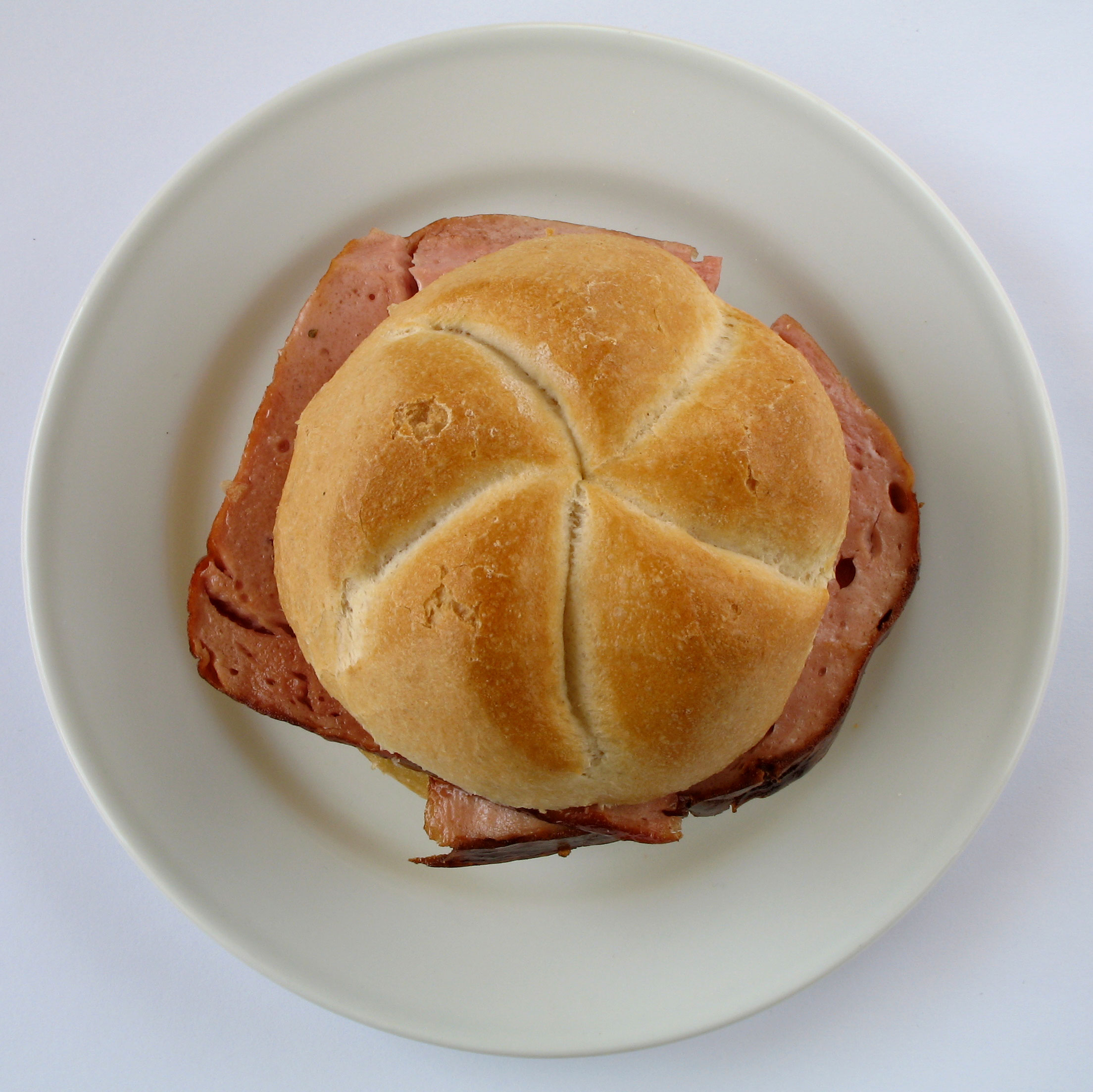 Leberkäs-Semmel ist ein traditionelles Fleischgericht der österreichischen und bayerischen Küche